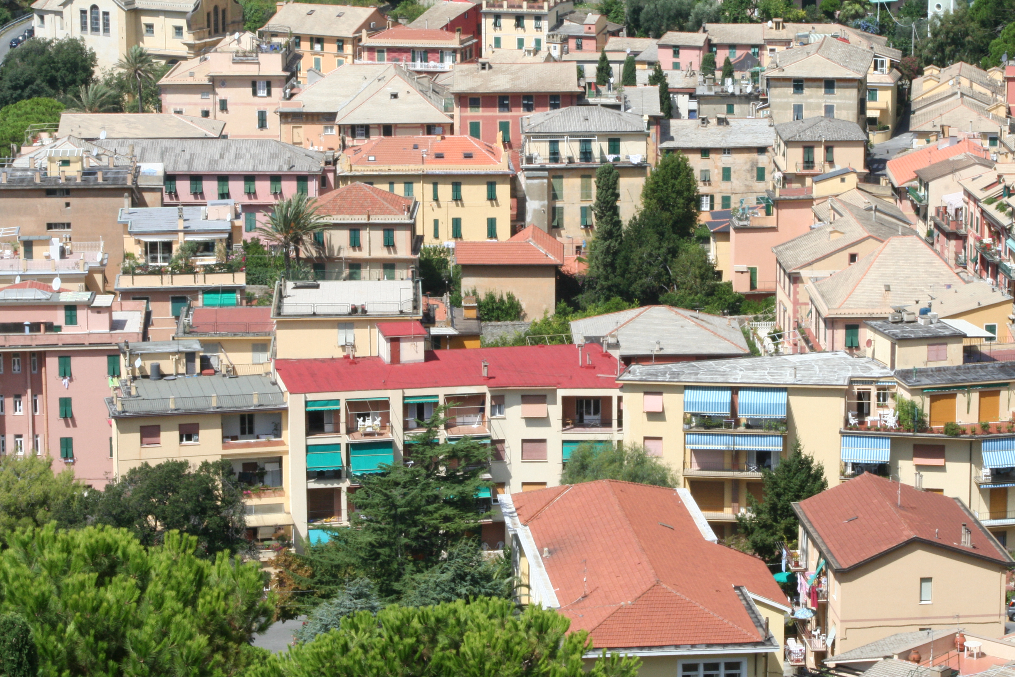 Bonassola, centro paese